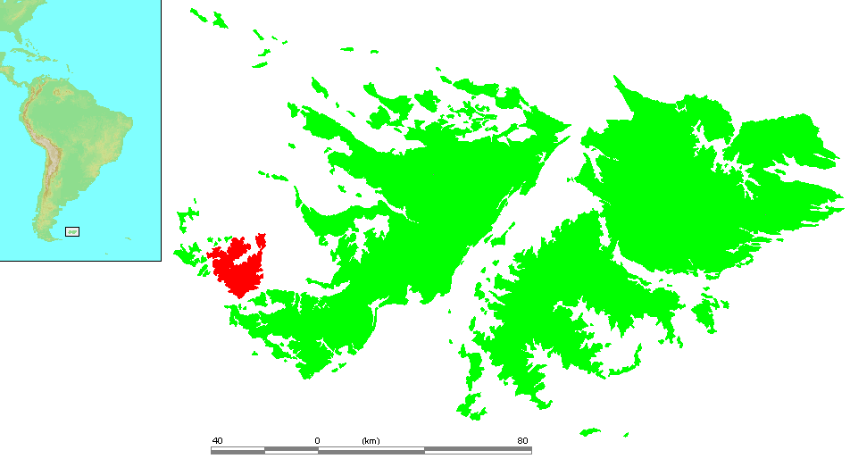 Falkland Islands - Weddell Island.PNG